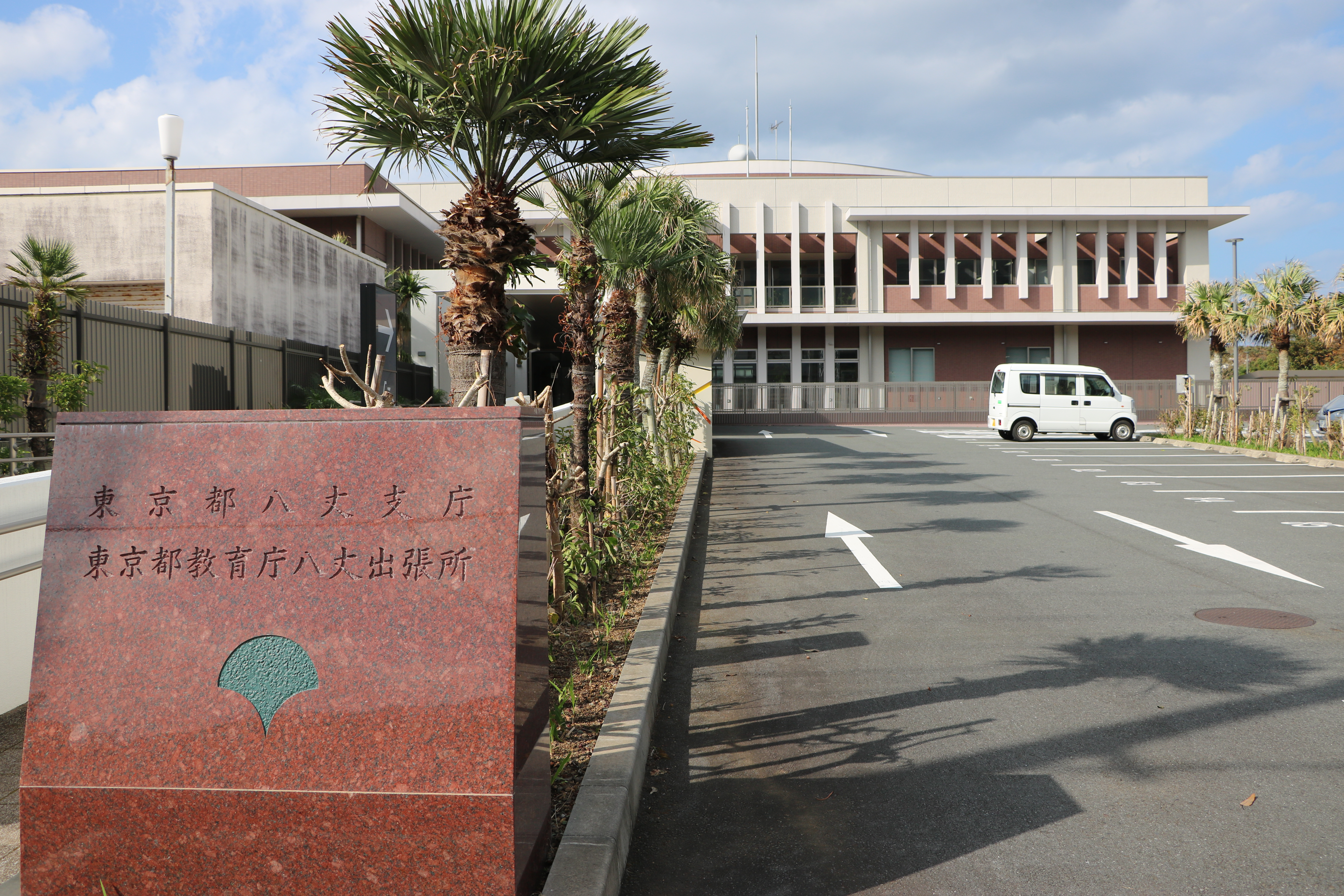 東京都八丈支庁庁舎（東京都八丈町）